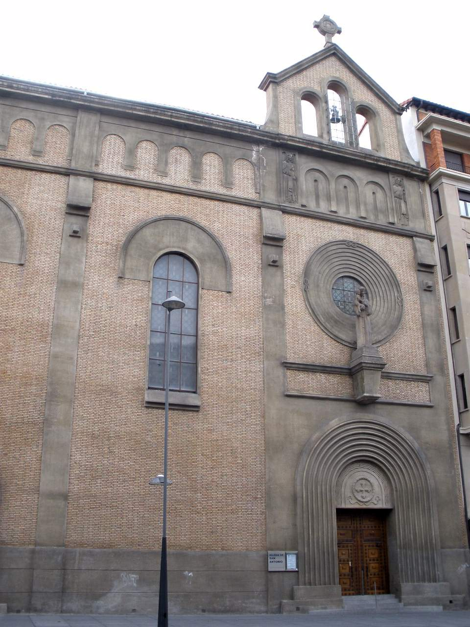 Iglesia de San Antonio (PP Capuchinos), en Pamplona